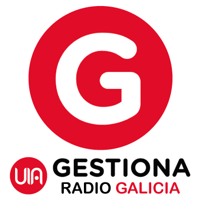 Via Gestiona Radio Galicia es la emisora generalista del Grupo Viartv